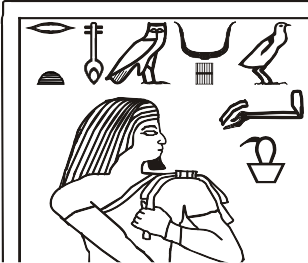 Porträt und Name des Wepemneferet